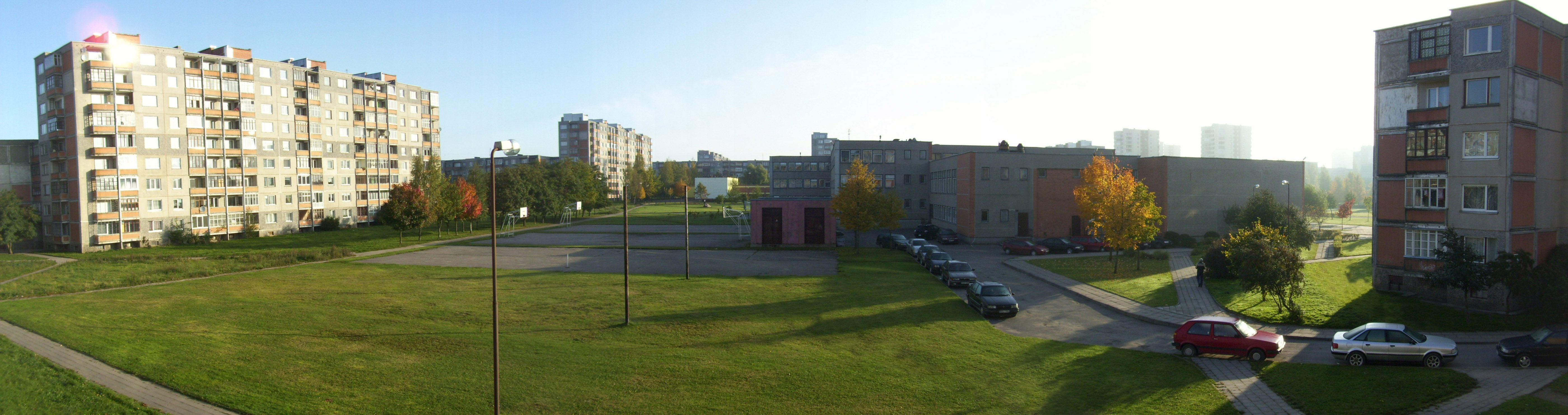 Dainų rajonas, Šiauliai